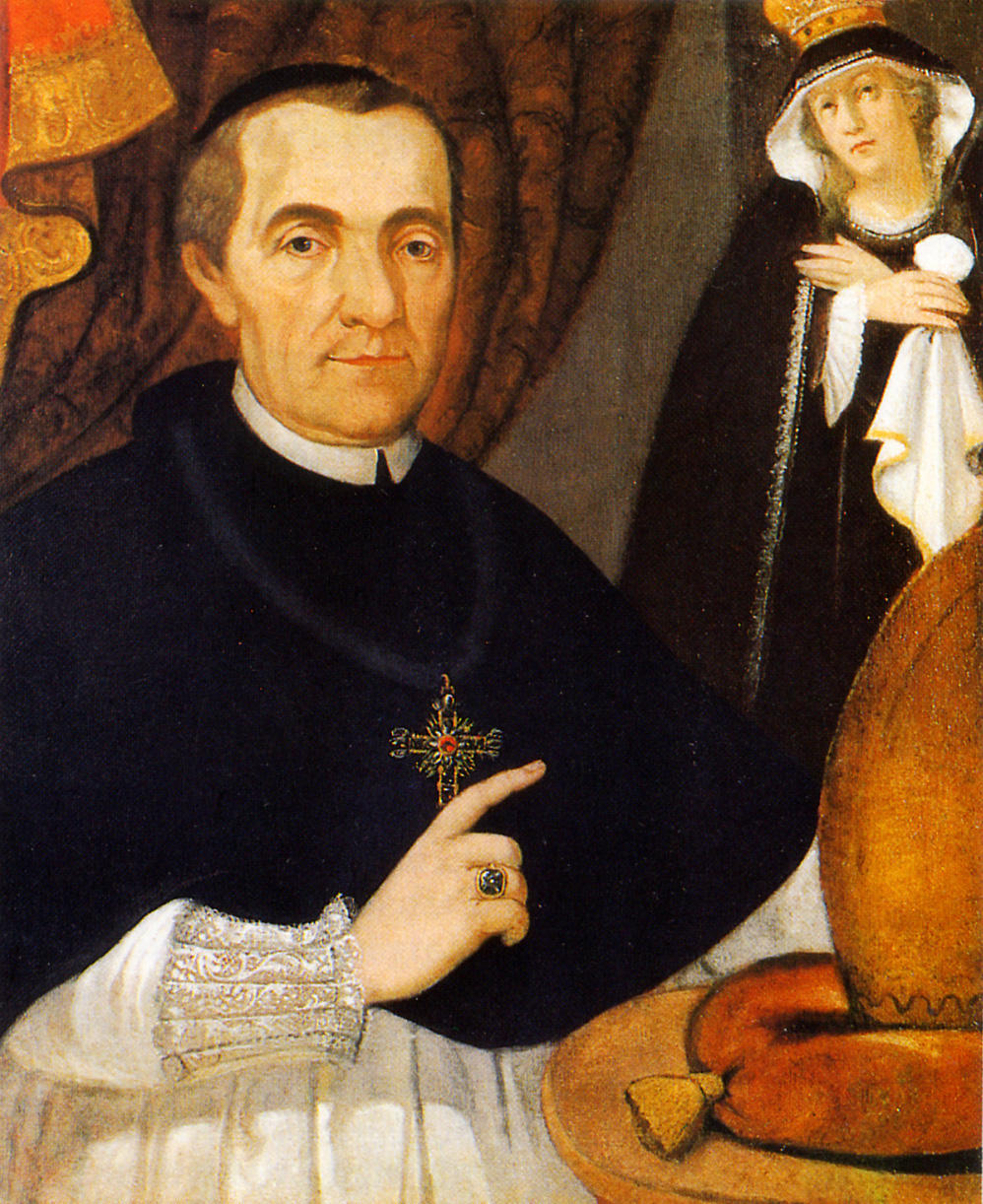 Gemälde im Kloster Plankstetten - Maurus Xaverius Herbst - Abt des Kloster Plankstetten in der Oberpfalz